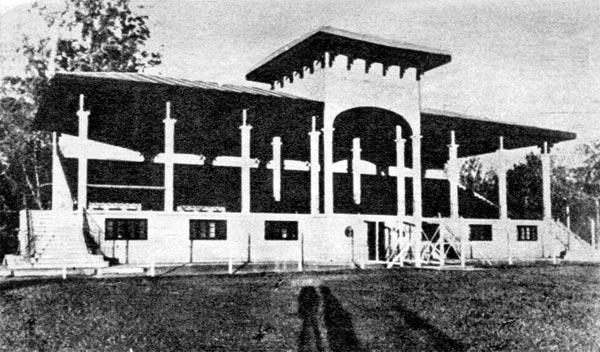 Platea techada del estadio Jorge Luis Hirschi, la antigua cancha de Estudiantes de La Plata.